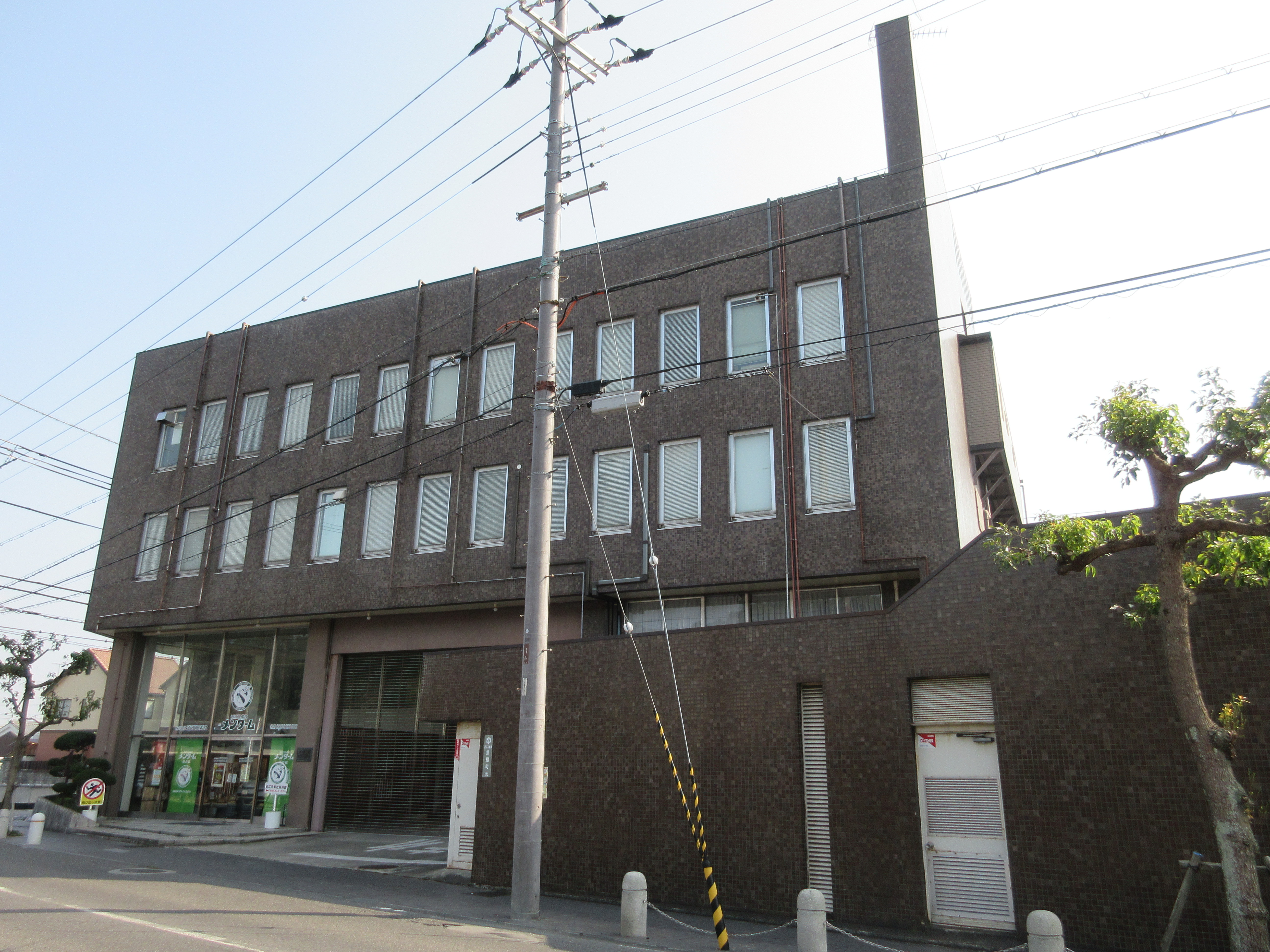 近江兄弟社本社